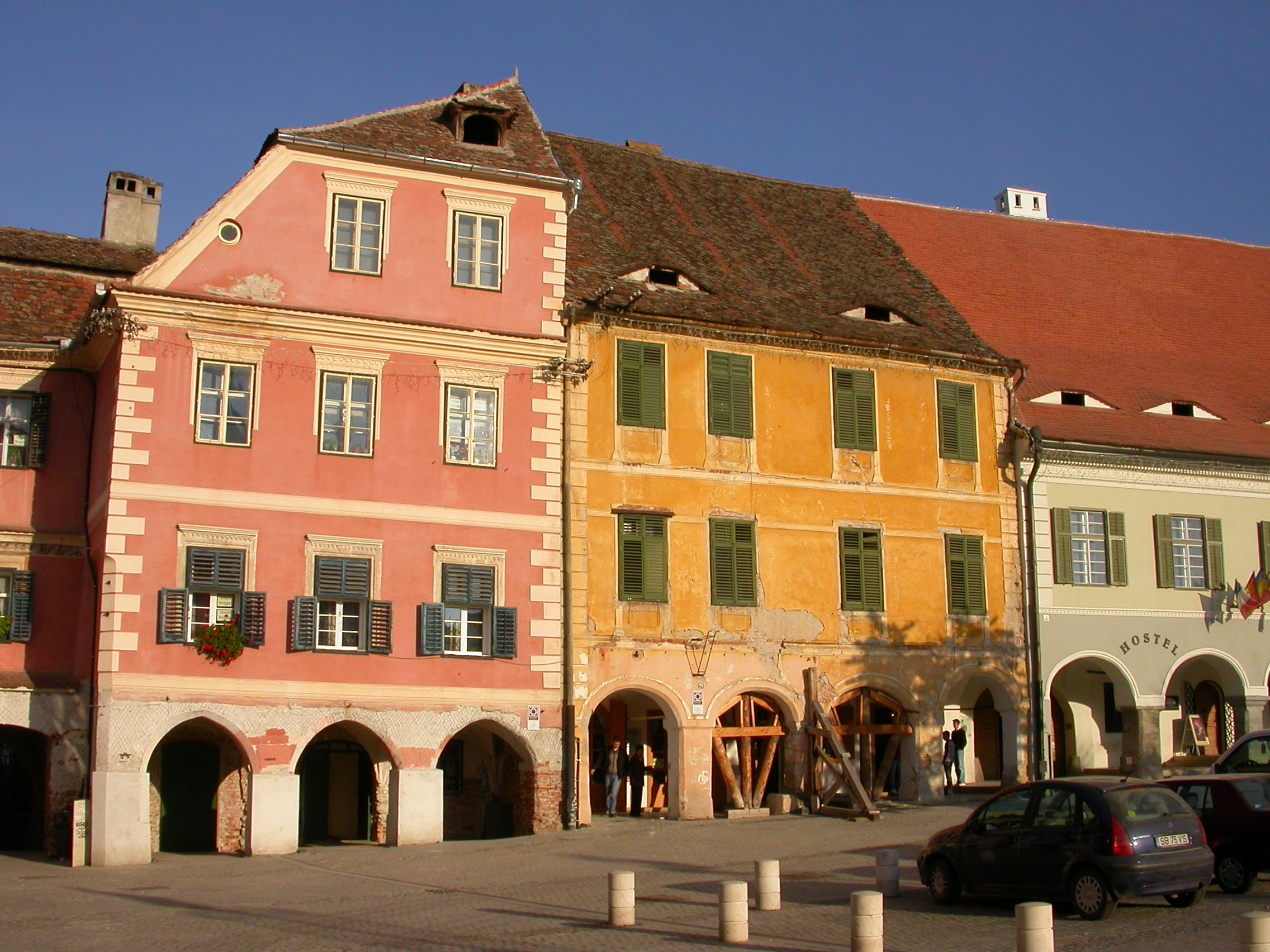 Casa Breslei Aurarilor, azi locuință, sec. XV - XVI, sec. XVIII (1745)